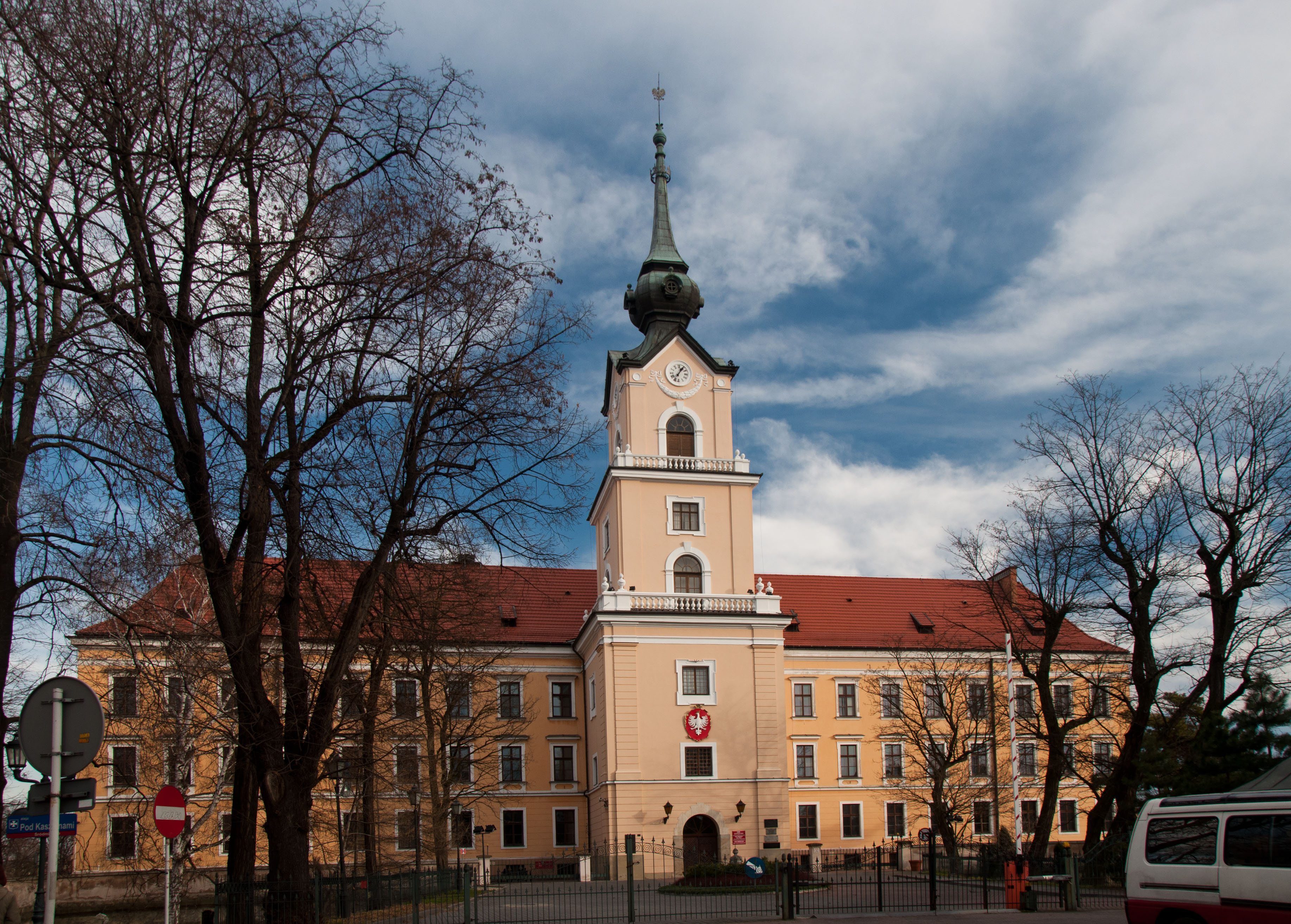 Rzeszów, zamek, 1600, 1903-1906